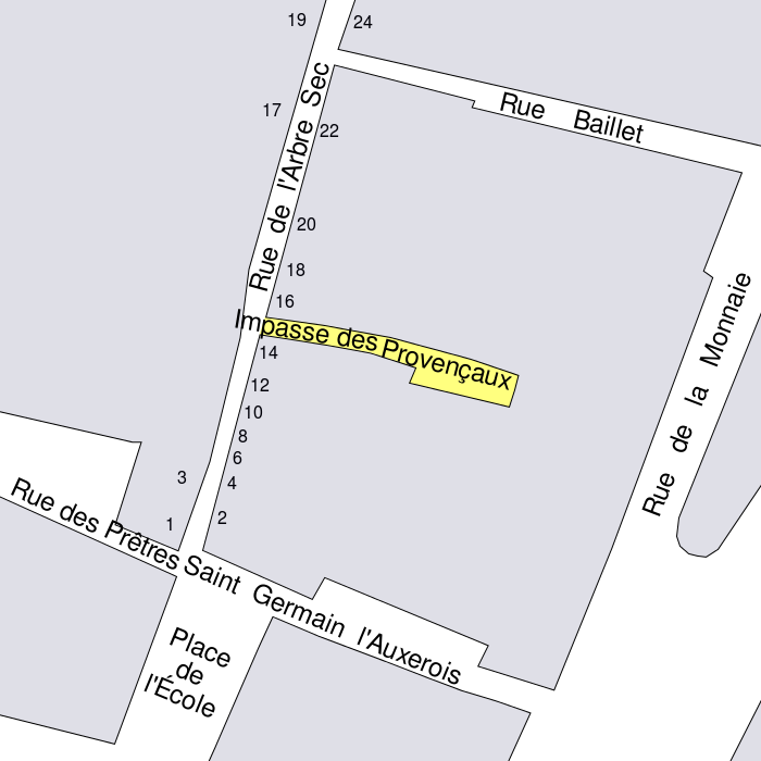 Plan des rues autour de l'impasse des Provençaux à la fin du XIXe siècle (paris, Ier arrondissement)